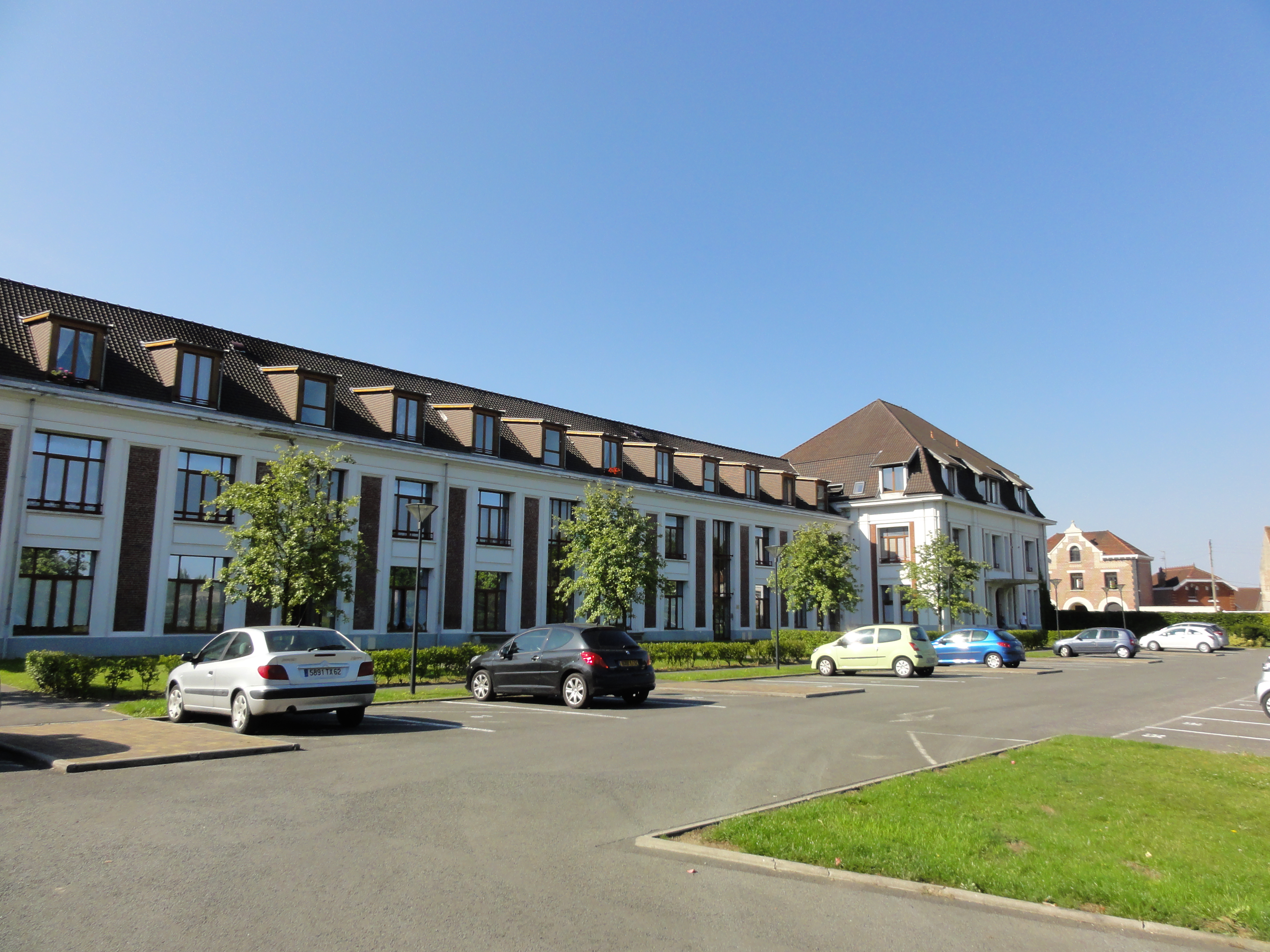 Grands bureaux de la Compagnie des mines de Nœux dans le bassin minier du Nord-Pas-de-Calais, Nœux-les-Mines, Pas-de-Calais, Nord-Pas-de-Calais, France. .